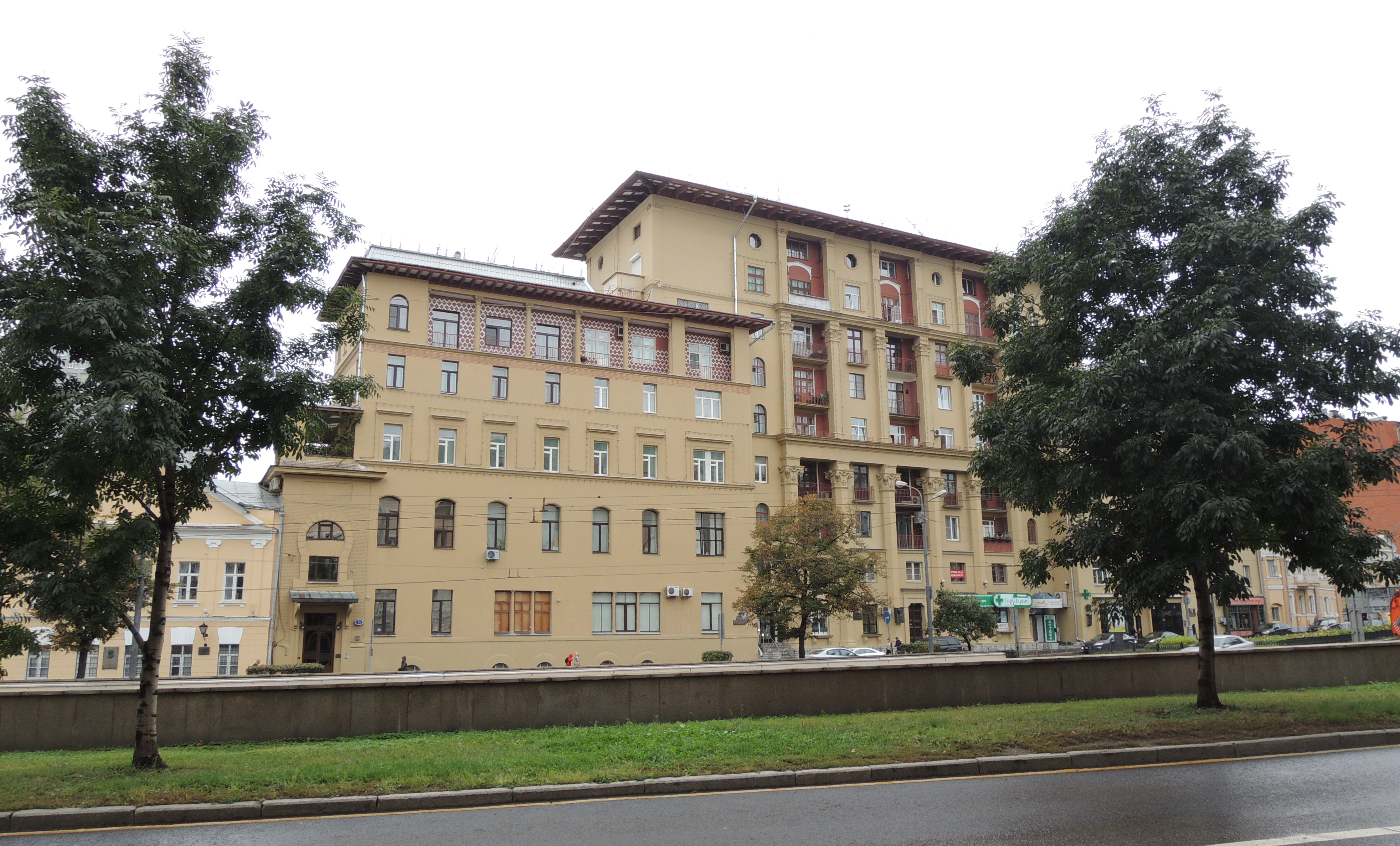 № 7Б-9/10 Sight symbol black.svg памятник архитектуры (региональный) — Жилой дом Главсевморпути («Дом полярников»). Изначально — доходный дом графини Н. А. Шереметевой, построенный в 1901 году архитектором Александром Мейснером (сохранился вход в доходный дом, № 7Б). Перестроен в 1936—1937 годах архитектором Евгением Иохелесом по заказу Главсевморпути[1]. Дом в итальянском стиле представляет собой один из наиболее изящных примеров предвоенной советской архитектуры. Здание, увенчанное широким карнизом, выходит на бульвар практически симметричным фасадом. Левое крыло отличается размером и формой окон, оно несколько повёрнуто относительно плоскости фасада — Евгений Йохелес включил в свой проект небольшой дореволюционный доходный дом, органично вписав его в больший масштаб нового строительства.